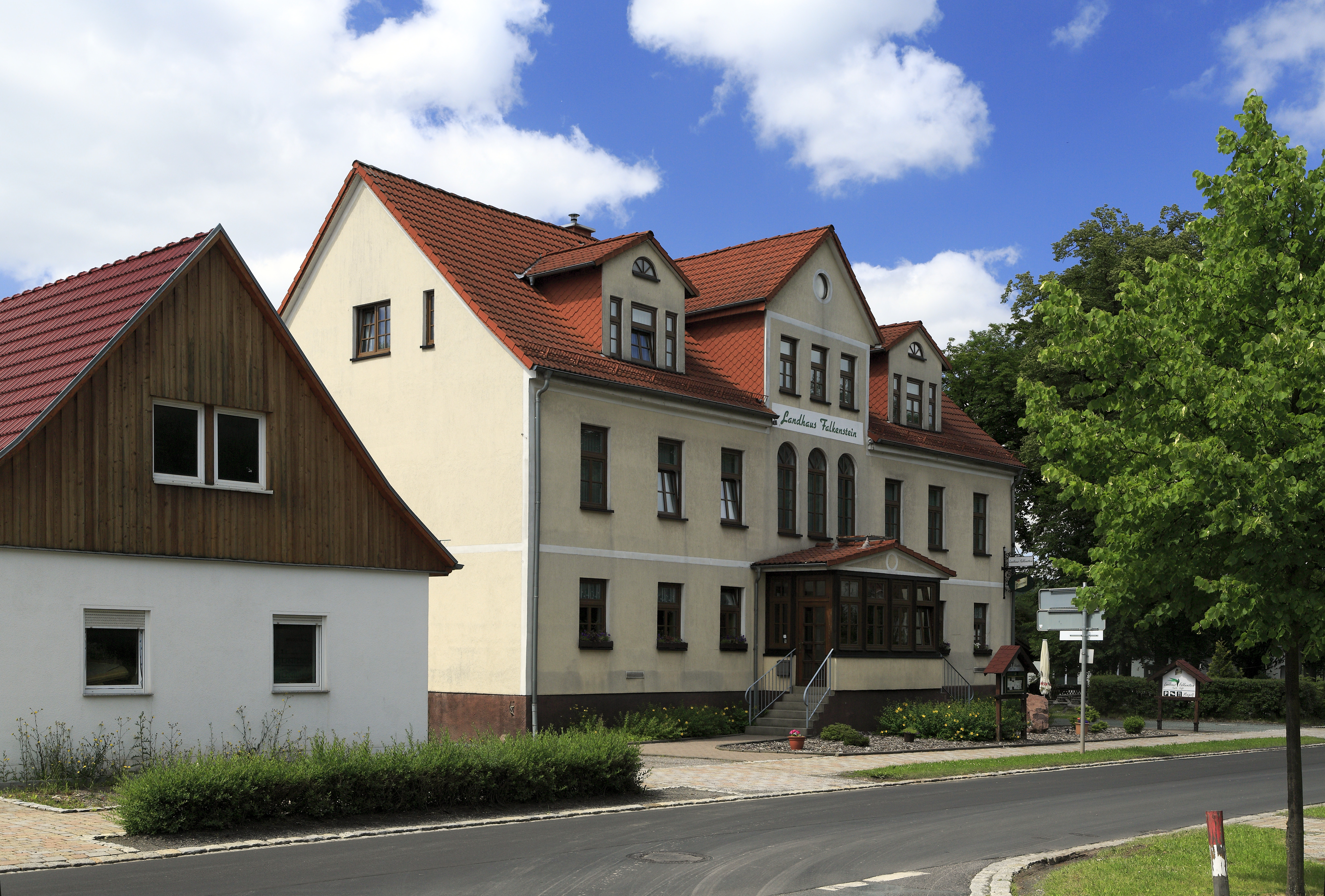 An der Bahnhofstraße von Dietharz, Abzw Oberhofer Straße zum Schmalwassergrund. Vorher wurde das Gebäude vom FDGB-Feriendienst als Ferienheim »8. März« genutzt.